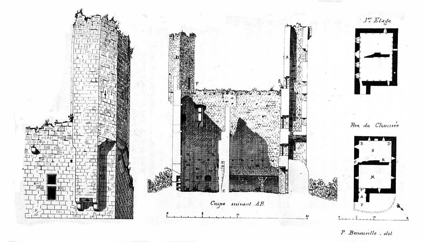 Élévation, coupe et plan du château du Tauzia (Gers) par Paul Benouville. Illustration de l’ouvrage de Ph. Lauzun « Les châteaux gascons de la fin du XIIIe siècle », Auch, G. Foix 1898.